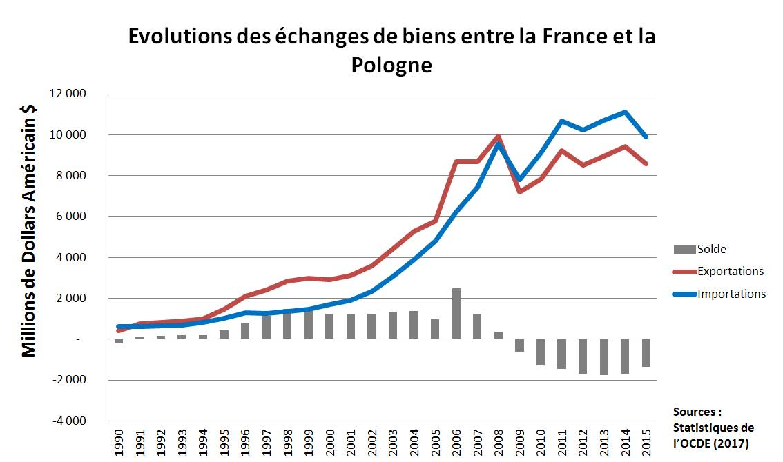 Le graphique tirée des statistiques de l'OCDE représente les échanges de bien entre les deux pays, ainsi que le solde commercial francais.